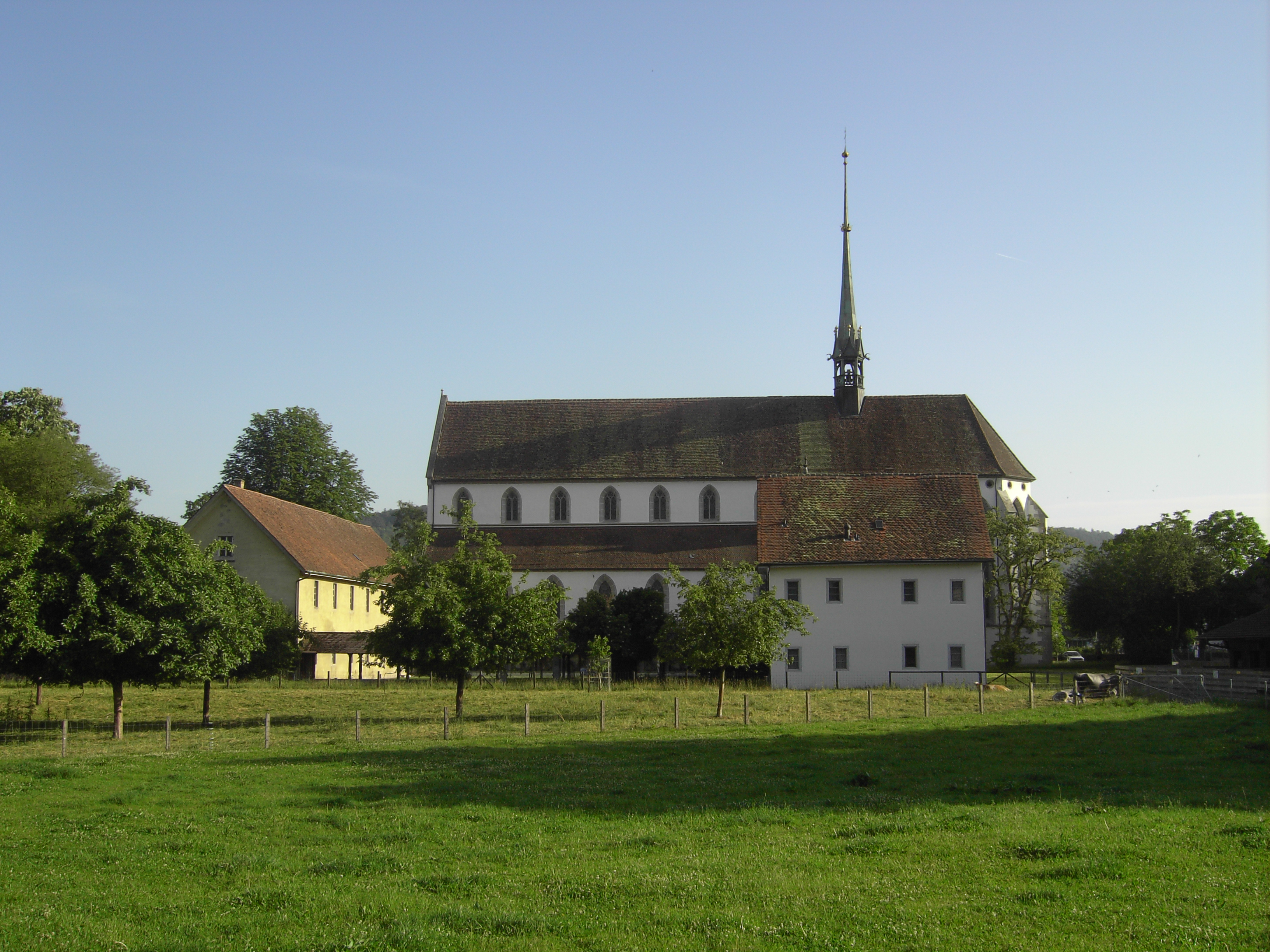 Klosterkirche Köngsfelden, Windisch CH